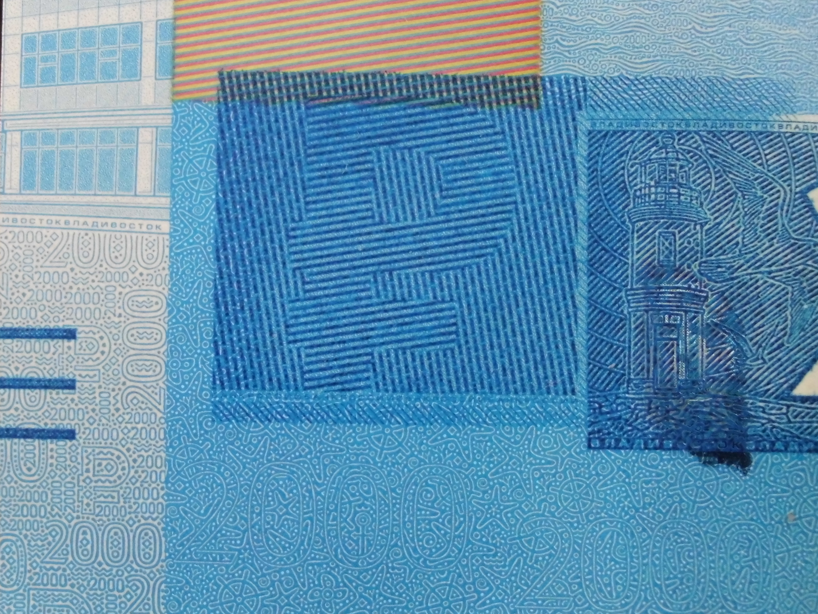 2000 российских рублей образца 2017 года. Аверс, слева снизу. Микротекст (ВЛАДИВОСТОК, 2000) и микрорисунки на морскую тематику.